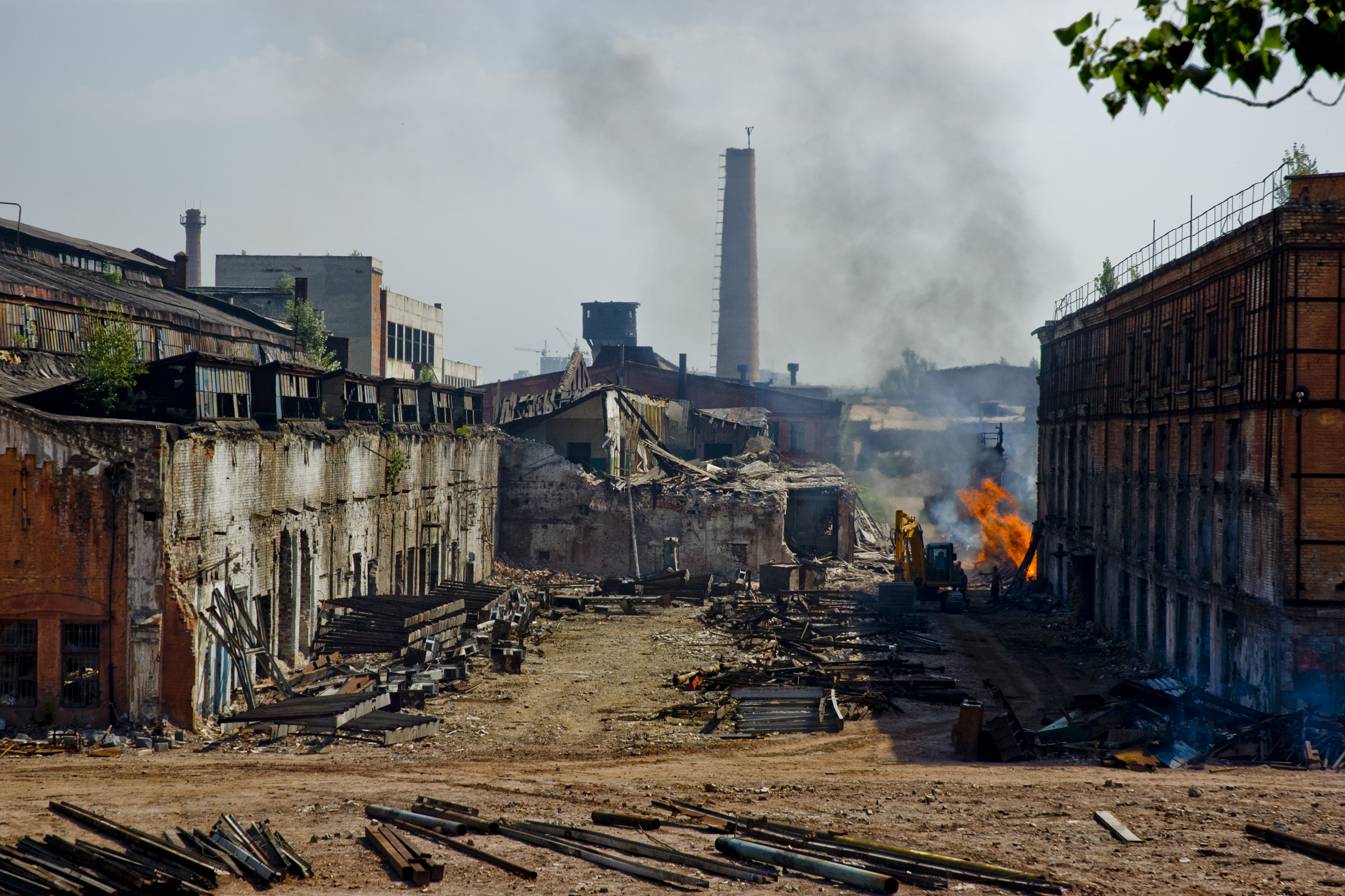 Будинок заводу «Серп і молот»., Харків, просп. Московський, 183